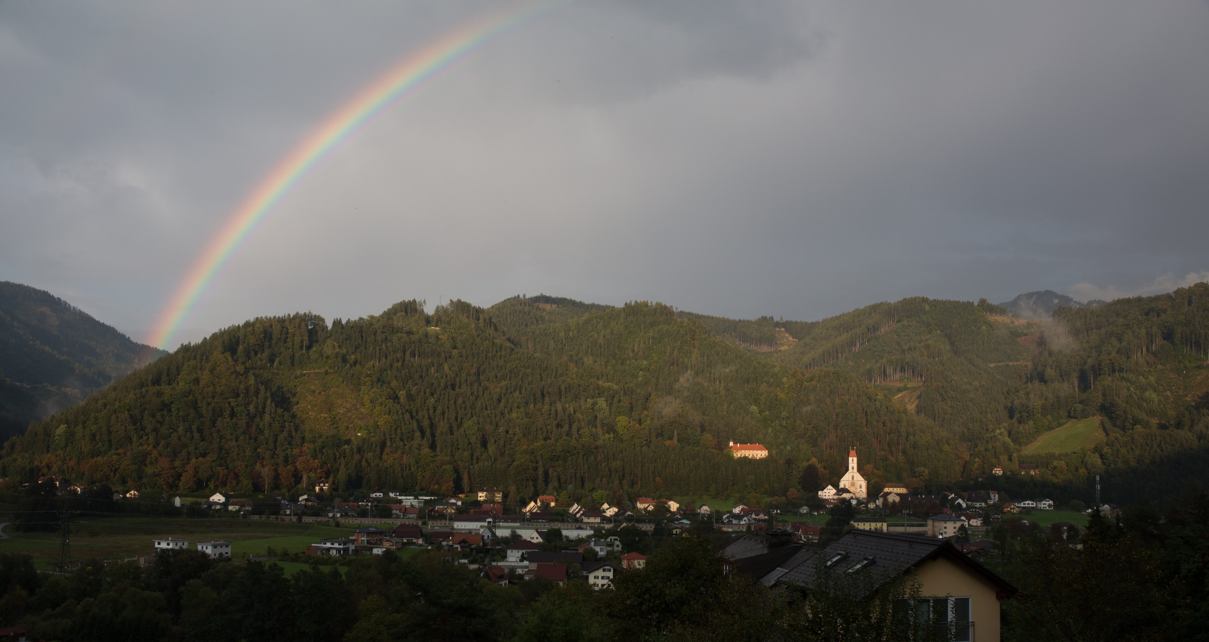 Pernegg an der Mur, Steiermark, Austria